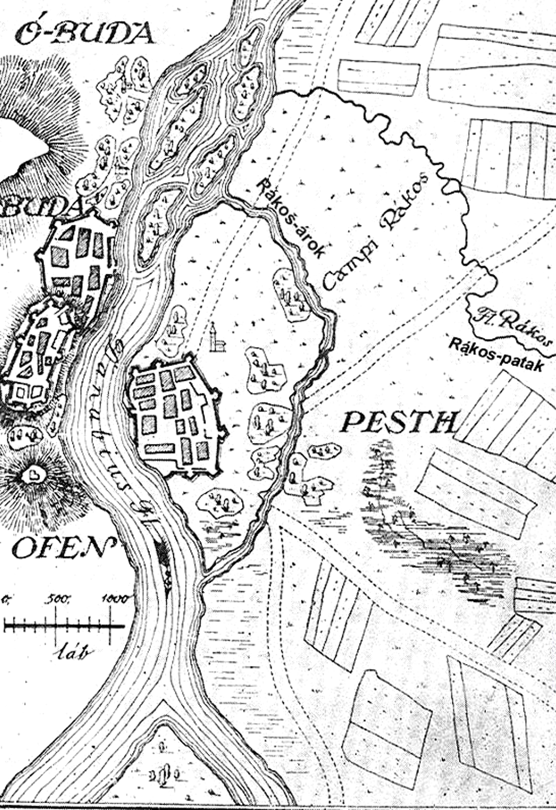 Mikovinyi Sámuel térképe 1737